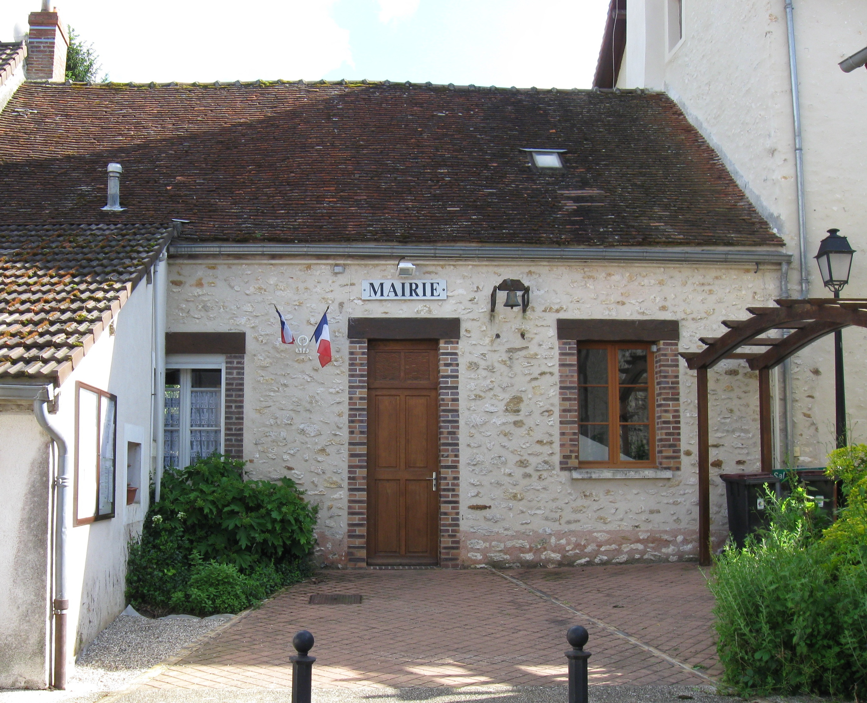 Mairie de Frétoy. (Seine-et-Marne, région Île-de-France).